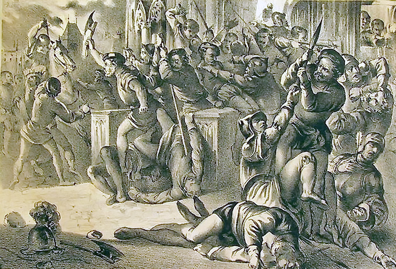 Zürich, Mordnacht von Zürich (1350) : Getönte Kreide-Lithographie von Anton Ziegler, 1848.